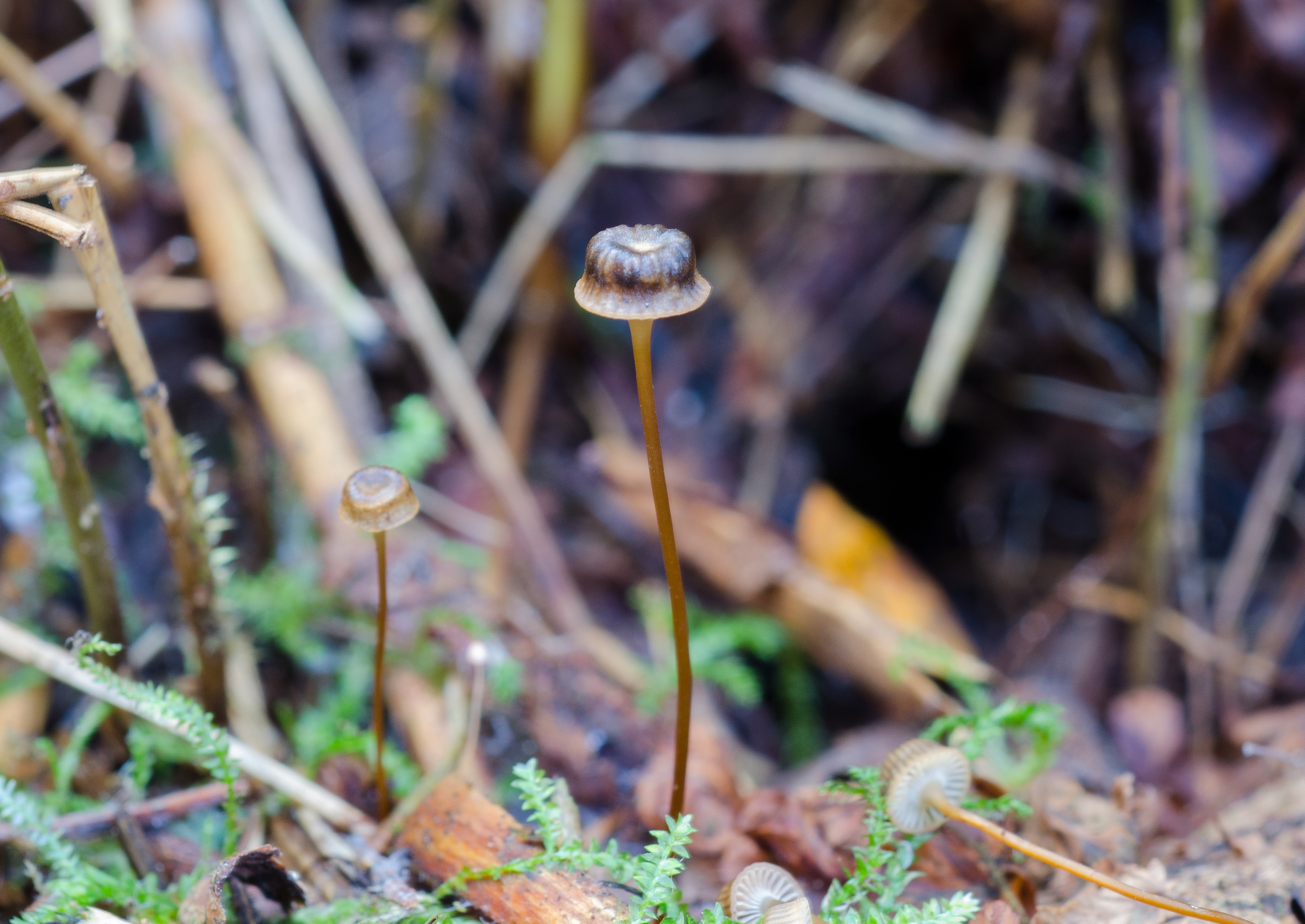 Sopparten sylinderhette (Xeromphalina picta, syn. Mycena picta).